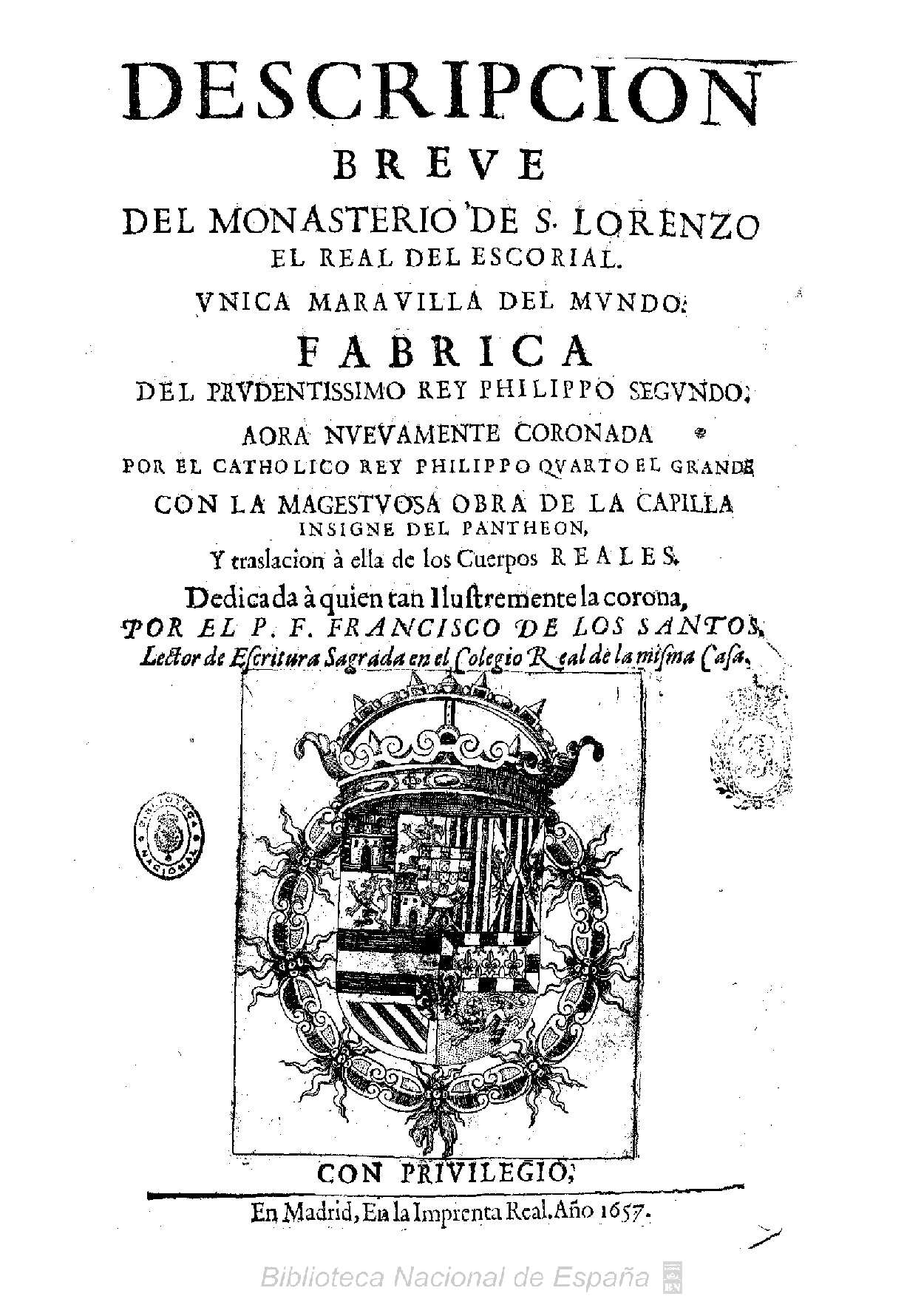 Descripcion breue del monasterio de S. Lorenzo el Real del Escorial, vnica marauilla del mundo, fabrica del rey Philippo segundo : aora nueuamente coronada por el ... rey Philippo quarto el Grande con la magestuosa obra de la Capilla ... del Pantheon y traslacion à ella de los cuerpos reales ... por el P.F. Francisco de los Santos ... Autor: Francisco de los Santos (O.S.H.) (m. 1699) ; Villafranca Malagón, Pedro (ca. 1615-1684) Fecha: 1657 Datos de edición: En Madrid en la Imprenta Real